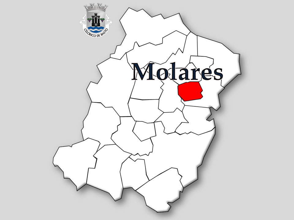 Censos 1864/2011